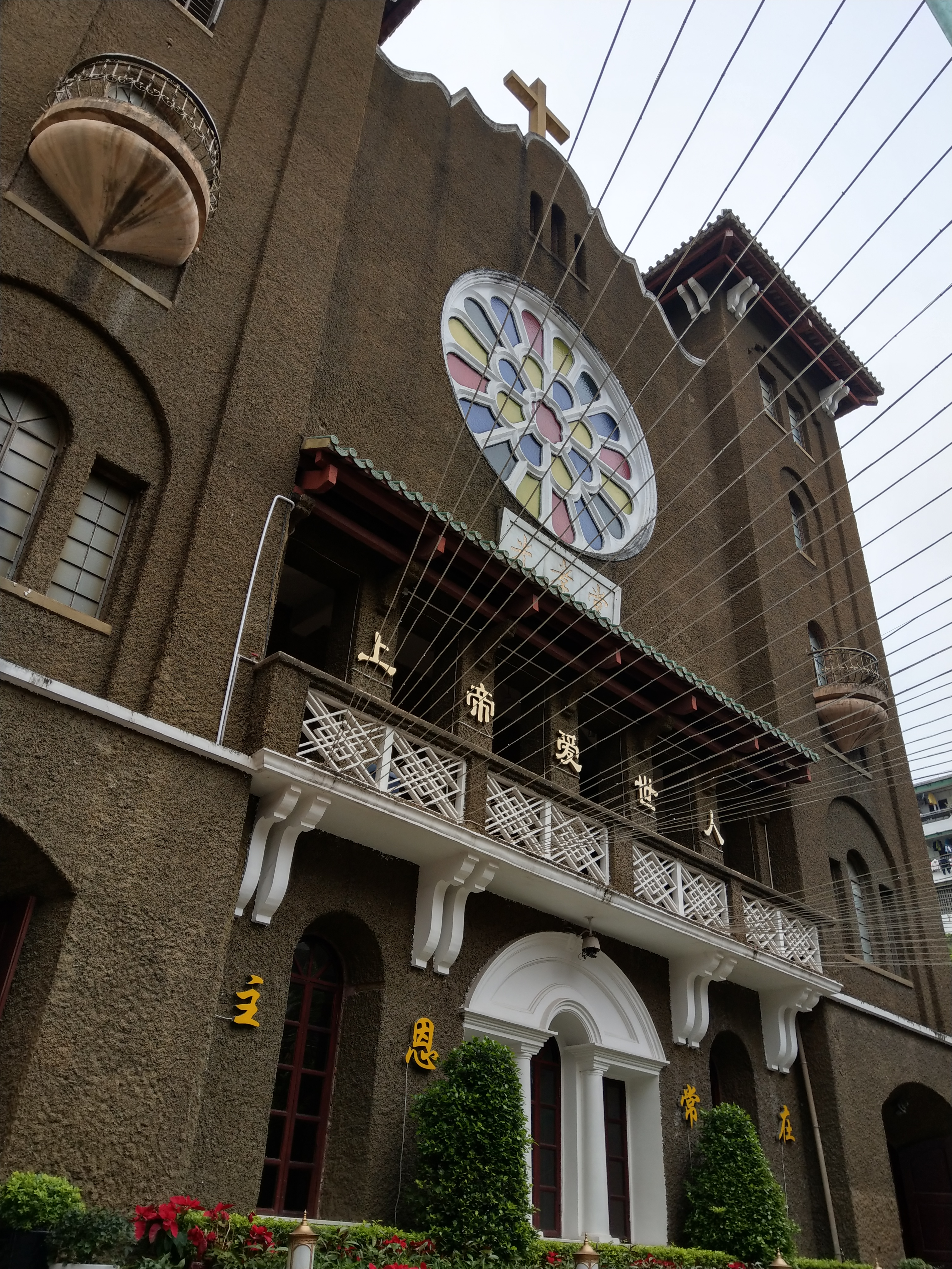 落成於1924年的基督教光孝堂，原屬廣東公理會及後來之中華基督教會廣東協會；文化大革命期間教堂被關，1991年復堂；現已被列入廣州市文物保護單位名單。